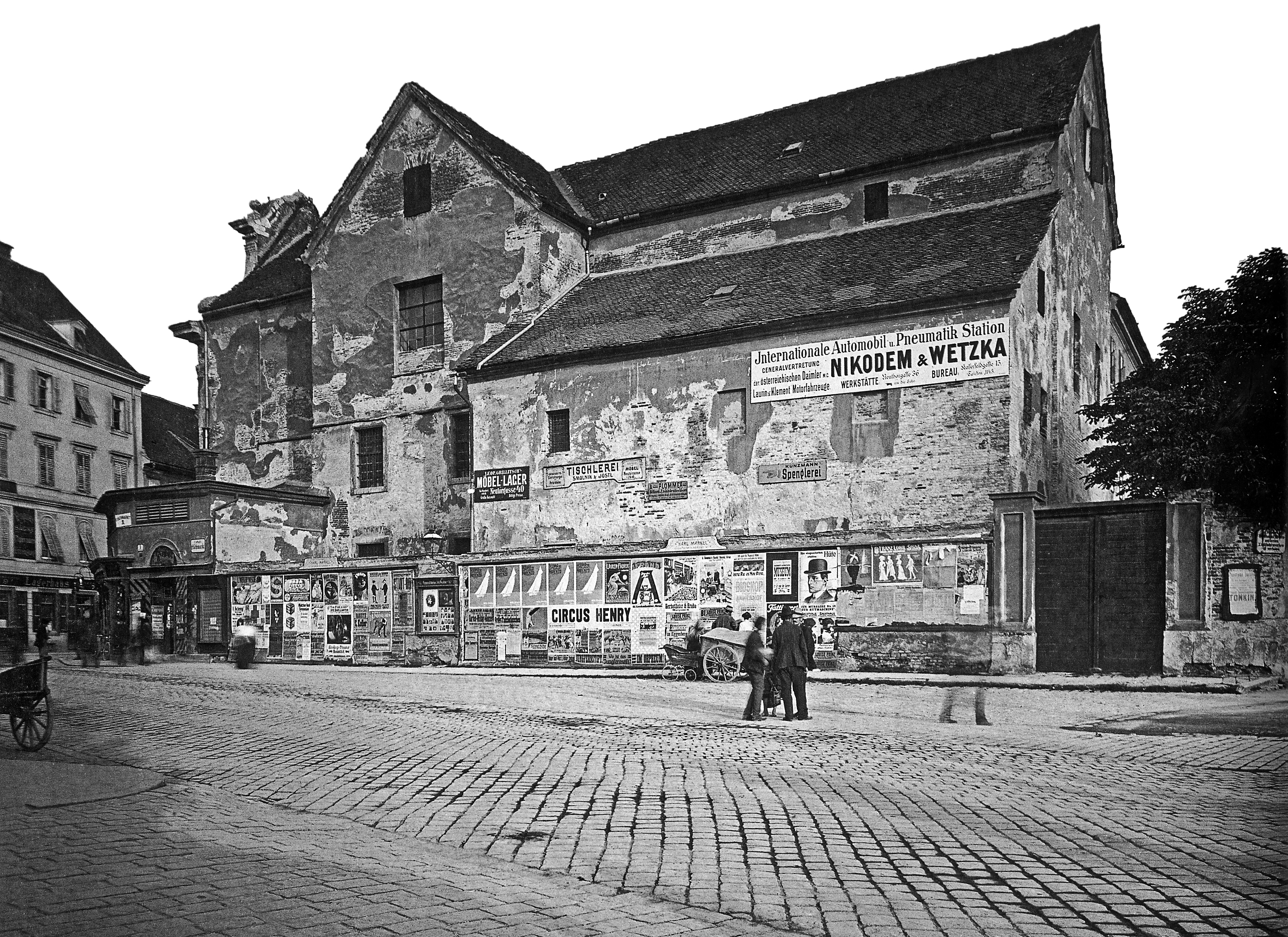 Graz, Altes k.k. Militär-Monturdepot (ehemaliges Karmelitinnenkloster), Fischmarkt 1